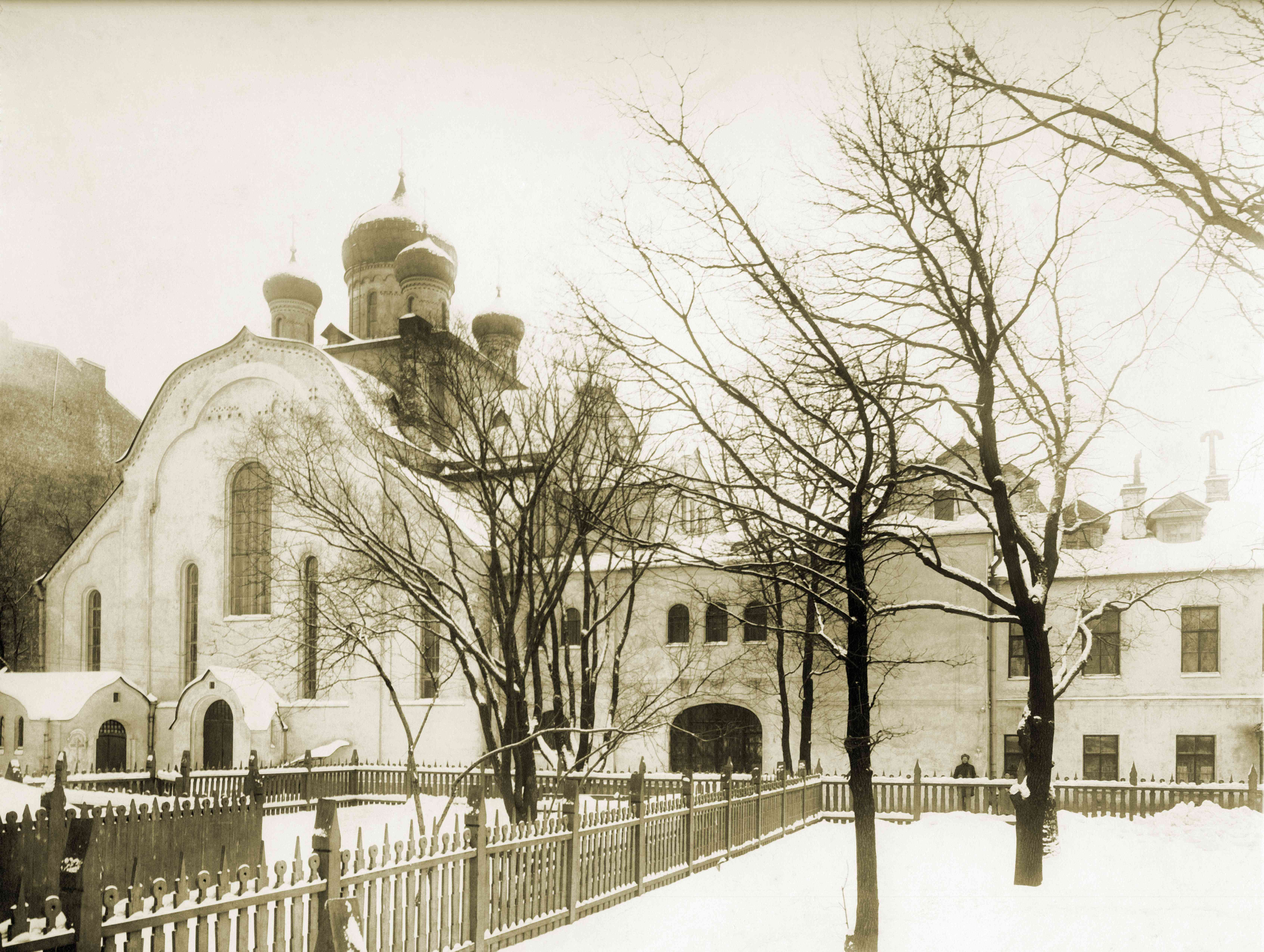 Северный фасад. Вид с территории комплекса. 1909г.